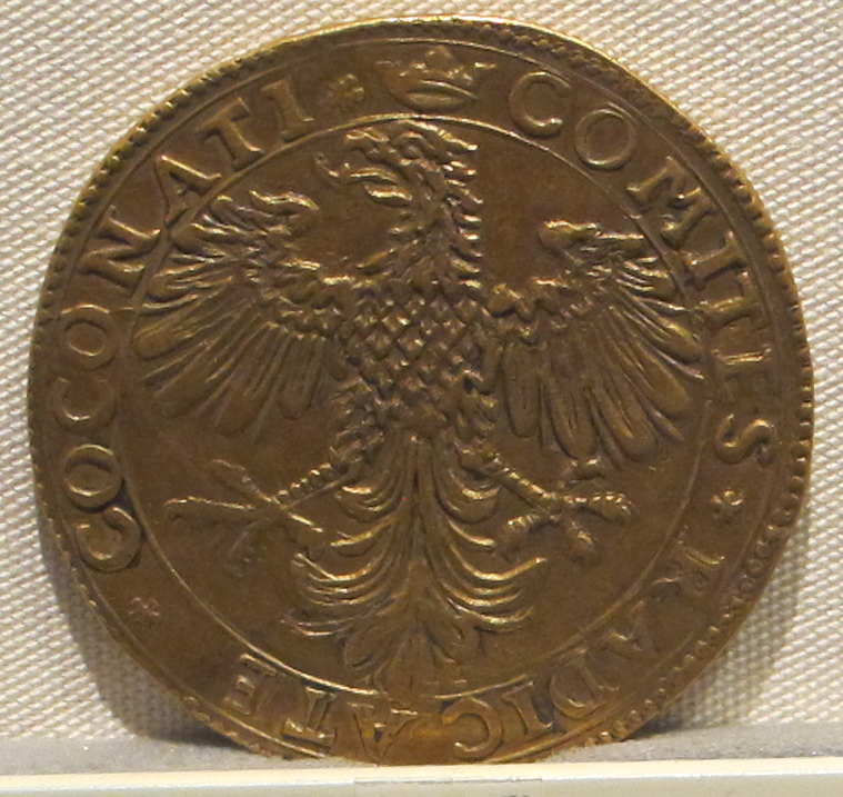 Palazzo Massimo alle Terme